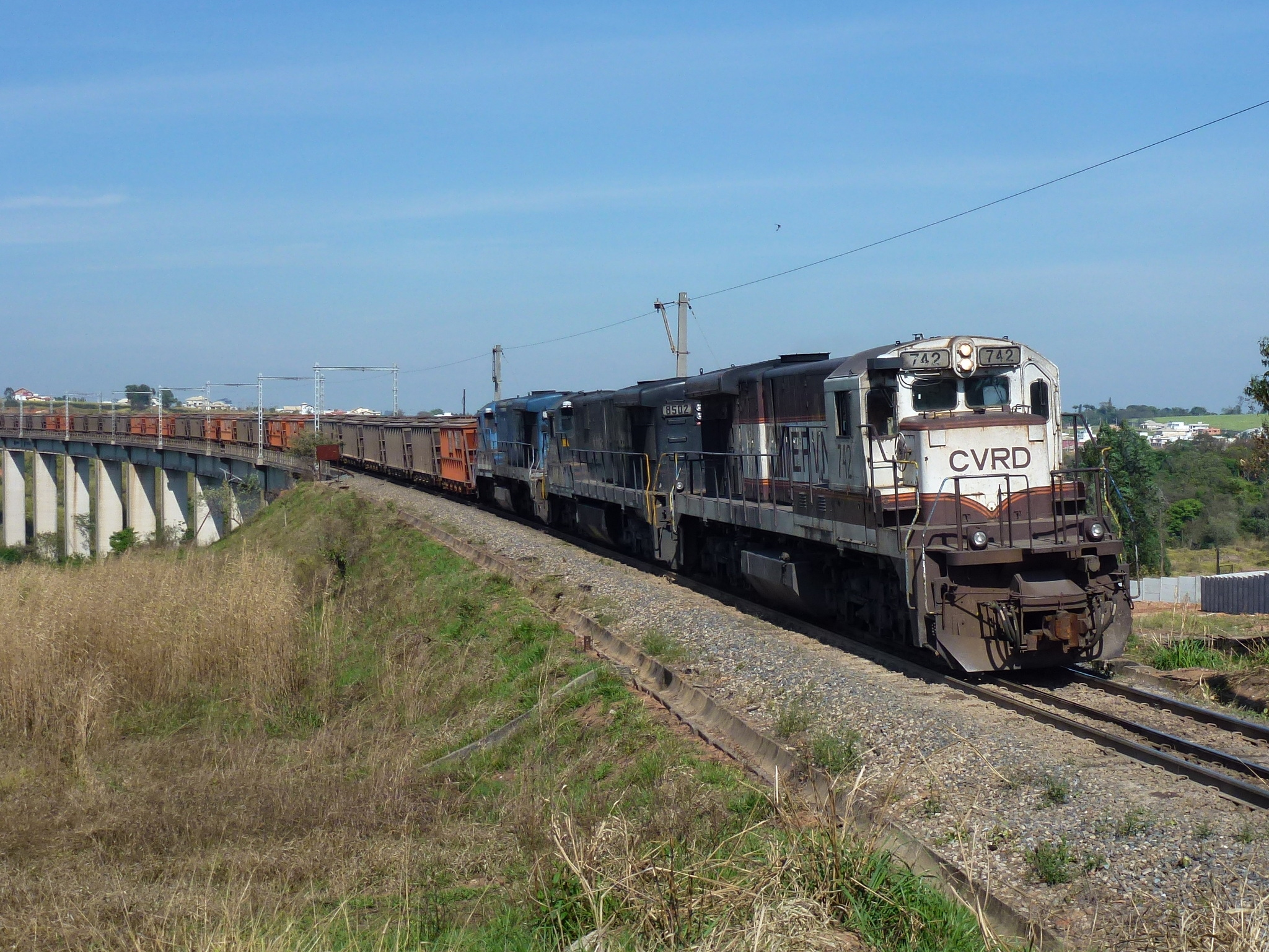 Locomotiva de comboio que passava sentido Boa Vista na Variante Boa Vista-Guaianã km 204 em Salto.